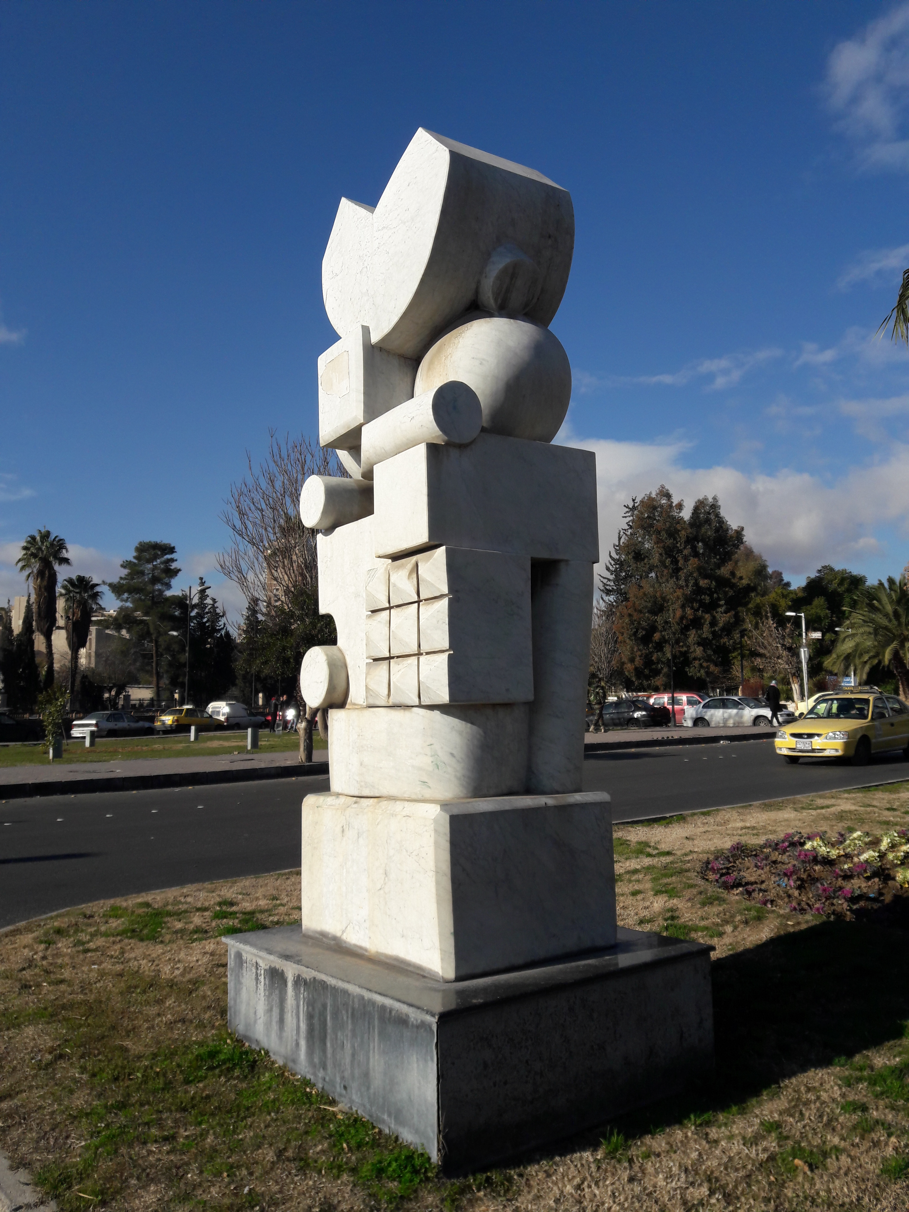 أحد المنحوتات الفنية في ساحة الأمويين